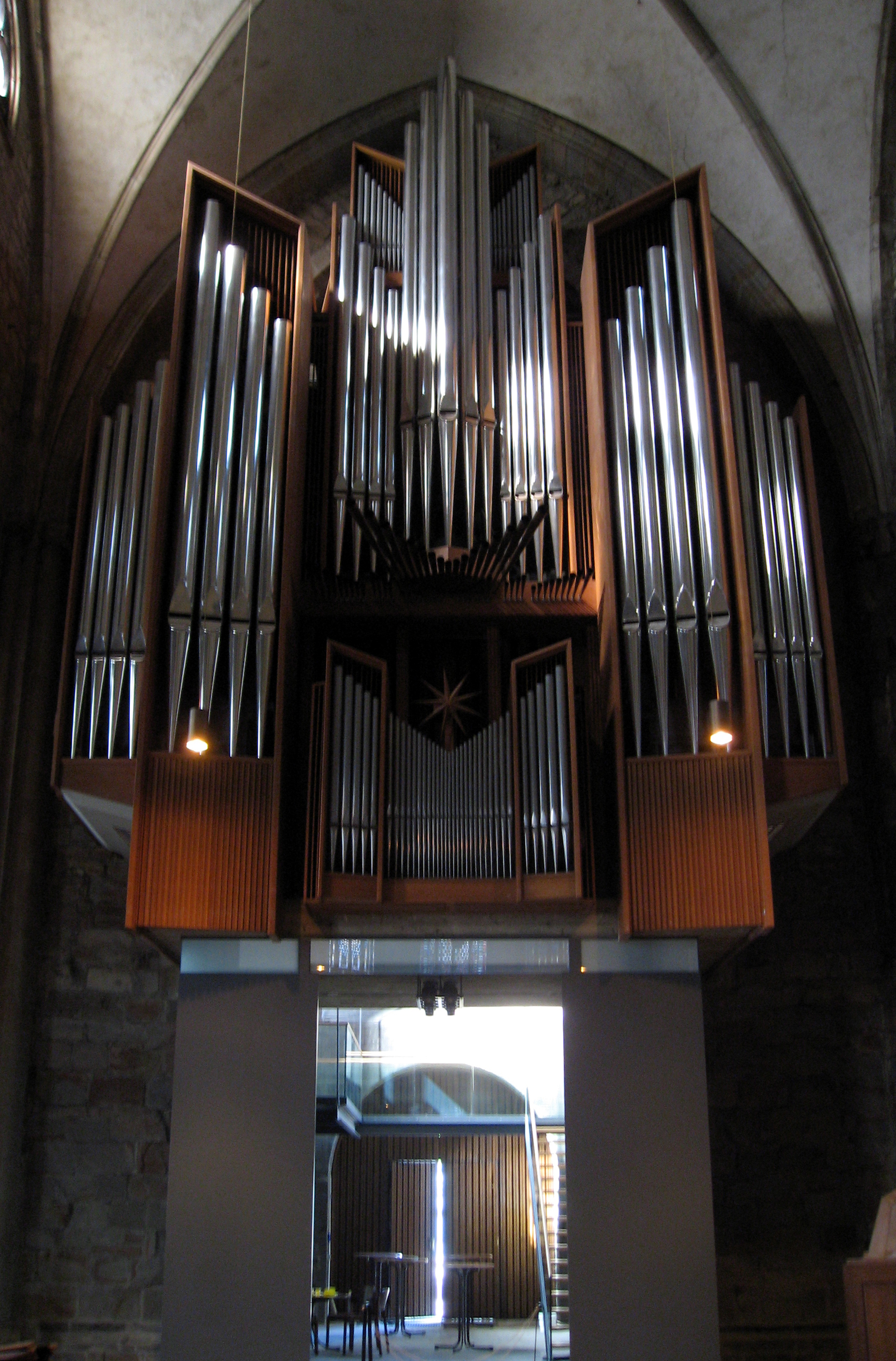 Dortmund, Reinoldikirche, Orgel